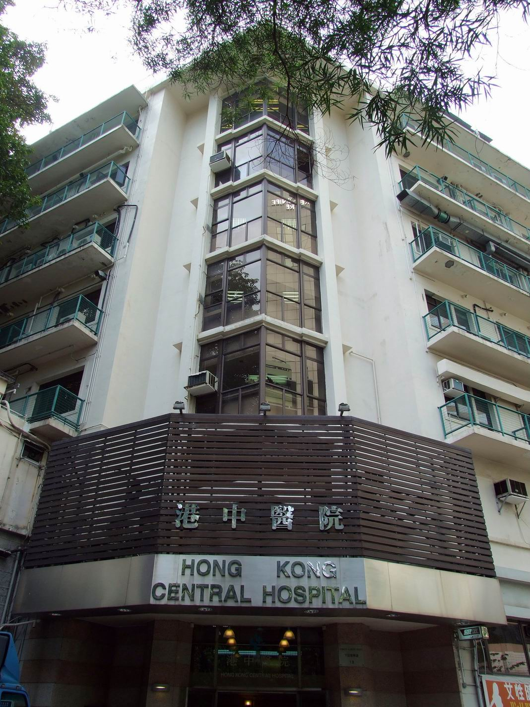 港中醫院